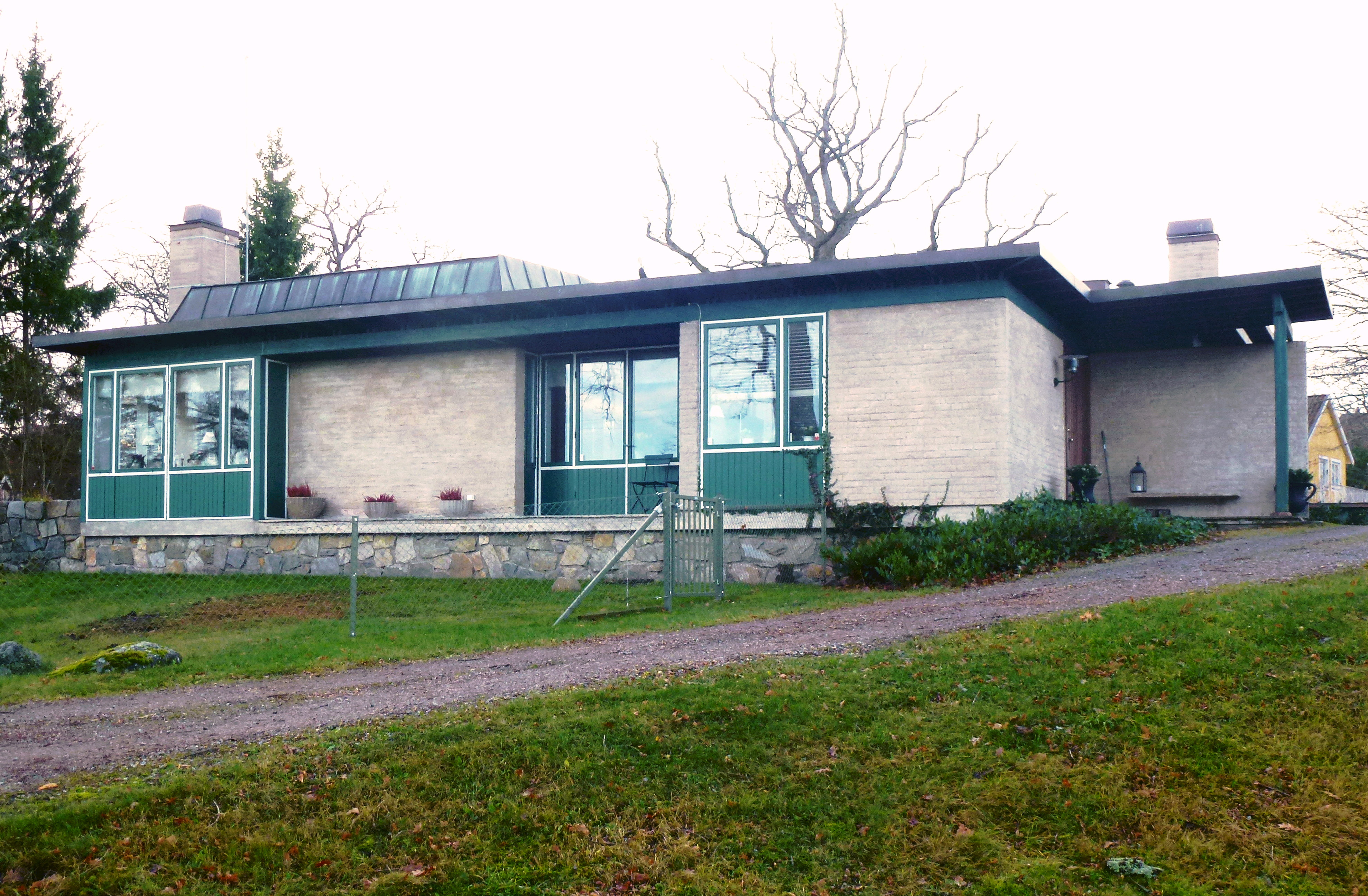 Villa Ranängen, arkitekter Léonie Geisendorf och Charles-Edouard Geisendorf